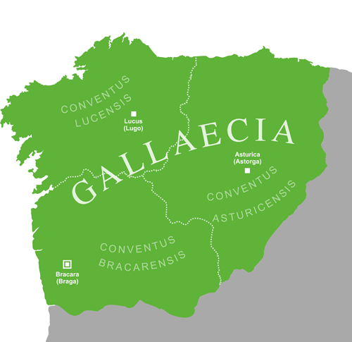 Mapa que amosa situación aproximada dos conventos xurídicos da Gallaecia tras a reorganización administrativa do emperador Diocleciano.